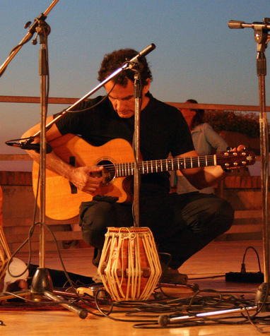 Andrea De Carlo a Bertinoro per la presentazione di "Mare delle Verità"